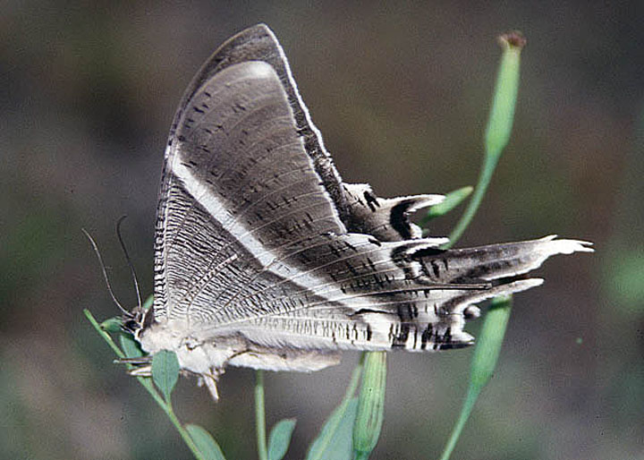 Lyssa zampa, side view